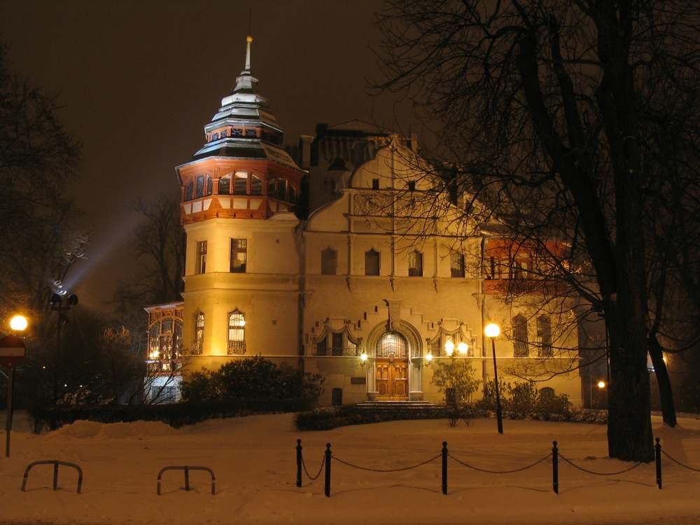 Willa Reinholda Richtera w Łodzi, dziś Politechnika Łódzka